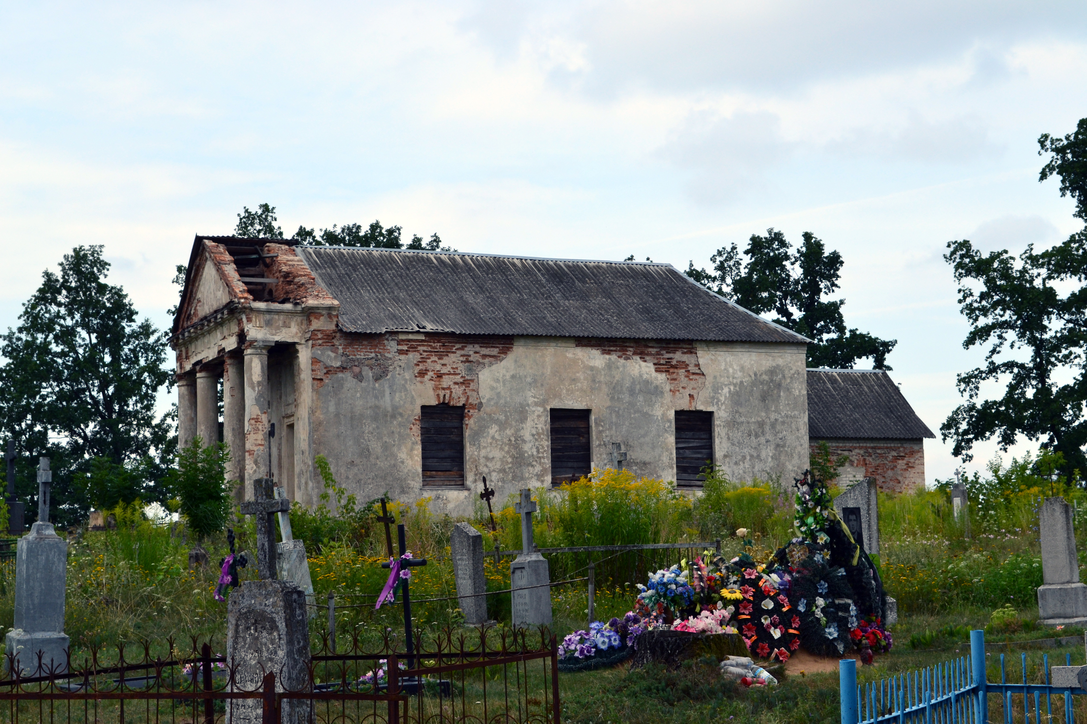 Беларуская (тарашкевіца): ::Капліца сьвятога Казімера (Ружаны)|Капліца сьвятога Казімера (Ружаны) This is a photo of Belarusian heritage monument. Reference number: 113Г000641 ( WLM)